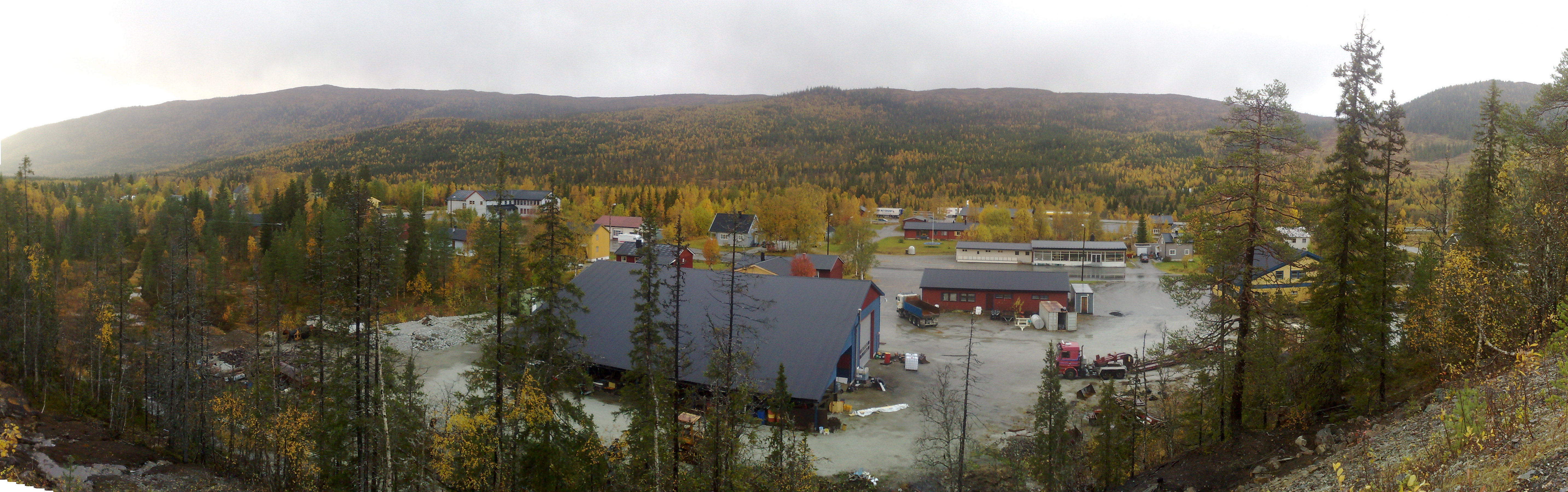 Panoramabilde av "sentrum" på tettstedet Brekkvasselv/Namsskogan/Nord-Trøndelag